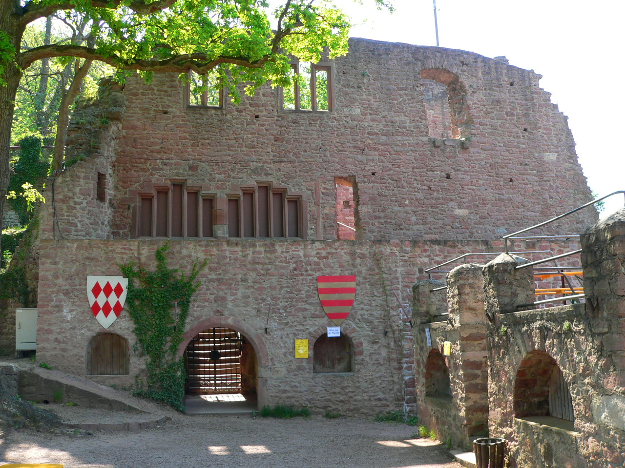 Clingenburg oberhalb von Klingenberg am Main, Germany - Seitenwand des ehemaligen Palas